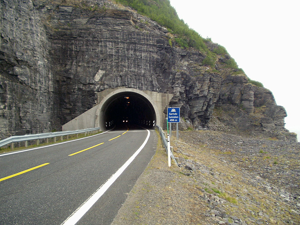 Åpningen på sørsiden av tunnelen